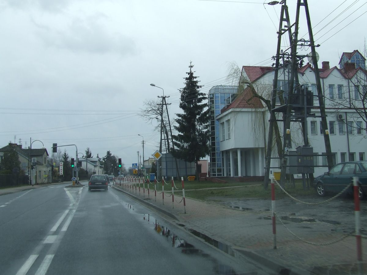 Nieporęt, rynek i ratusz przy drodze na Warszawę